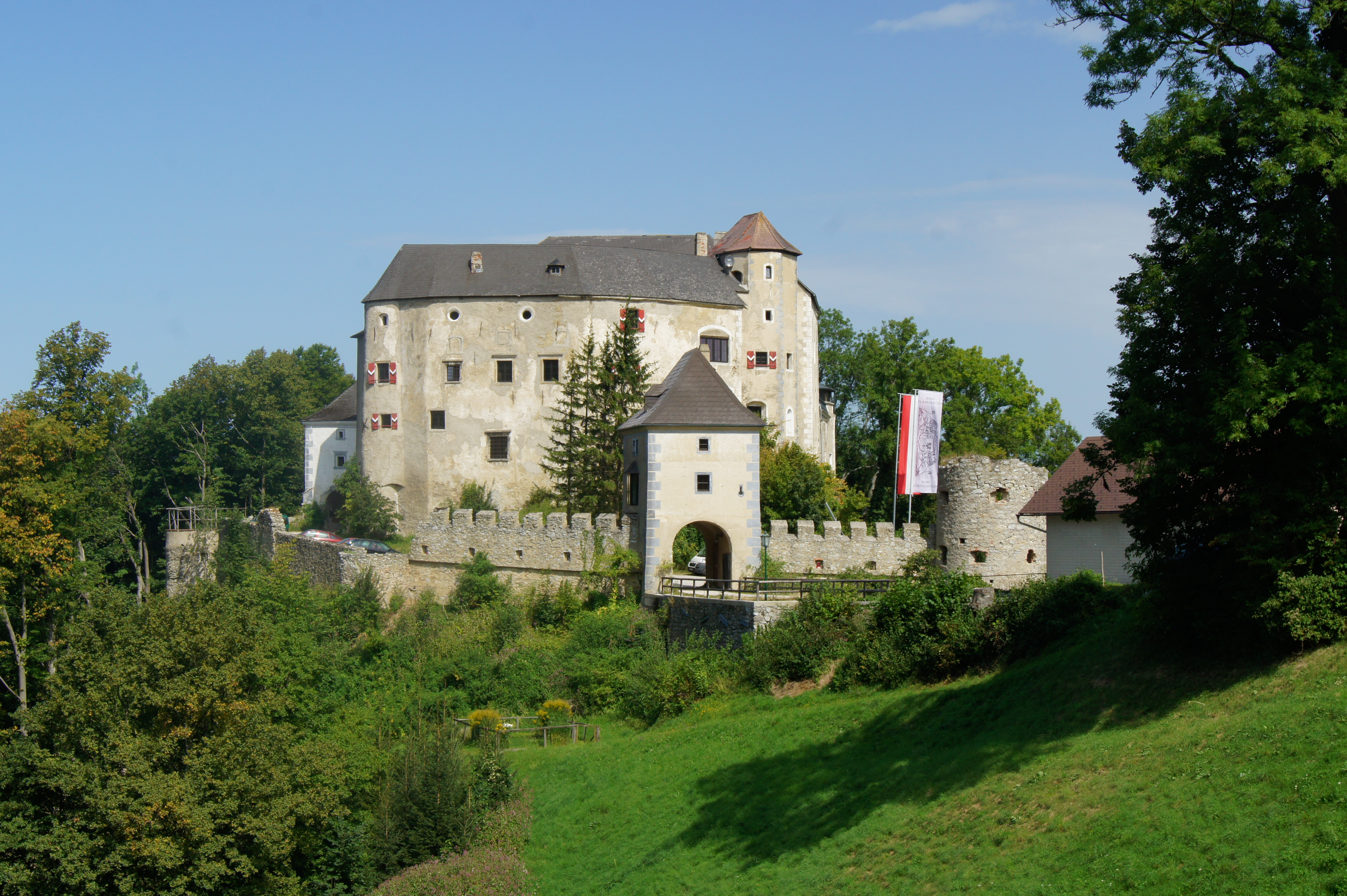 Burg Plankenstein vom Norden aus